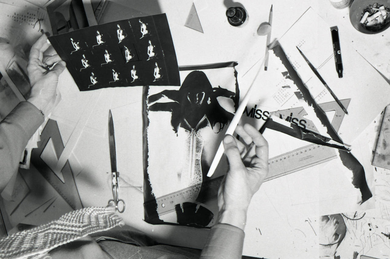 Servizio fotografico : Bologna, 1970 / Paolo Monti. - Strisce: 7, Fotogrammi complessivi: 36 : Negativo b/n, gelatina bromuro d'argento/ pellicola ; 35 mm. - ((I fotogrammi hanno una doppia numerazione. . - Sul portanegativi: HP4. - Nell'agenda di lavoro citata in nota Monti specifica che le foto sono state scattate presso lo studio dell'artista, sito in Via Saragozza n°83 a Bologna, per il catalogo della mostra. - Occasione: Documentazione di alcune opere dell'artista Pirro Cuniberti per il catalogo di una mostra tenutasi presso la Galleria Foscherari. - Fonte: Fattura di Paolo Monti: IV. Commesse/ Fattura (1970/03/13), presso Archivio Paolo Monti. - Fonte: Agenda di Paolo Monti: Monti/ 3 aprile 1966 - 9 marzo 1971/ 12421-16823 (1966-1971), presso Archivio Paolo Monti